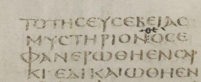 verse of 1 Timothy 3:16 in Codex Sinaiticus